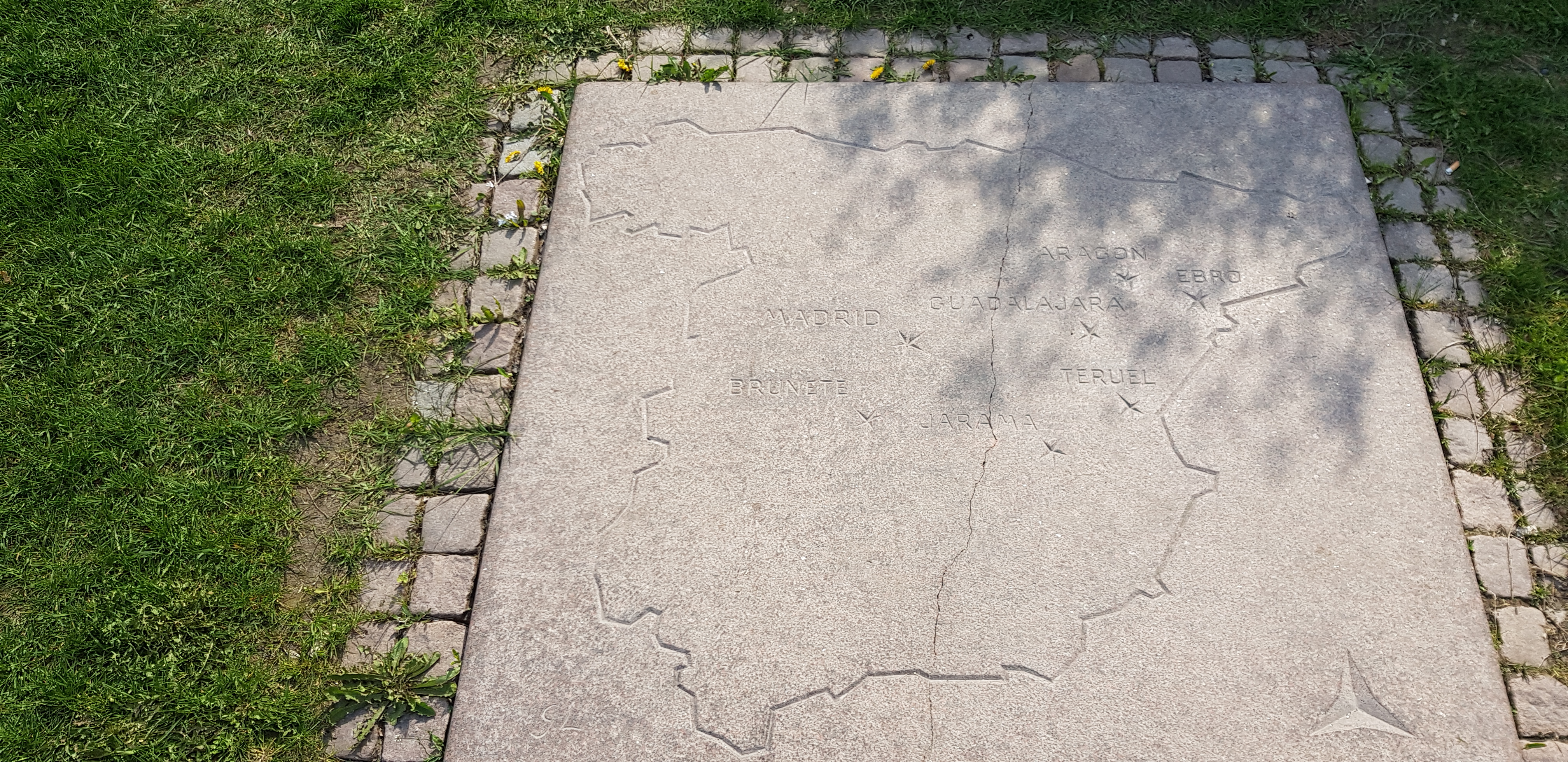 Karta över Spanska inbördeskriget vid la mano på Södermalm i Stockjolm